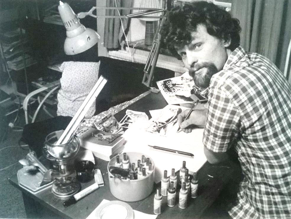 Sören Axén (1940–2014) i sin ateljé hösten 1974. Foto: frilansfotografen Stieg Eldh (1928–2016). Bilden finns publicerad i boken Det var då volym 3 (1996, s. 113), utgiven av Stieg Eldh. Bilden ser ut att vara tagen i samband med ett reportage om Axén infört i Ystads Allehanda 1974-10-18 (s. 1 och 10). I Det var då volym 3 är bilden daterad "741101".